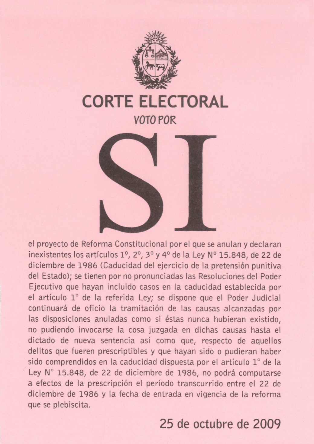 Papeleta que indica el "SI" por la anulación de la Ley de Caducidad en el marco del referendum de las elecciones de octubre de 2009 en Uruguay.